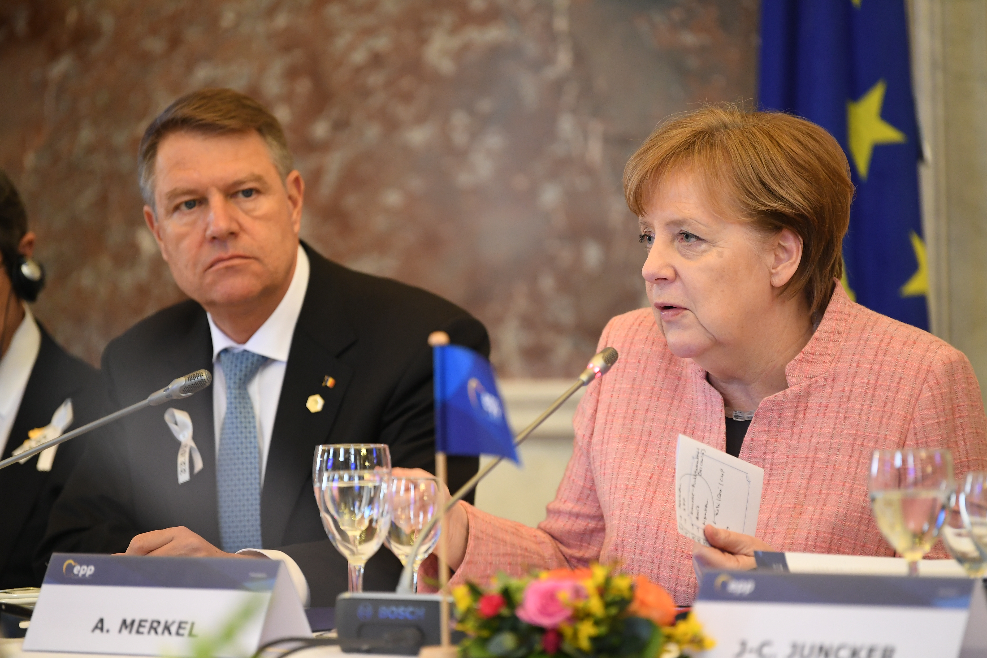 EPP Summit, 22 March 2018